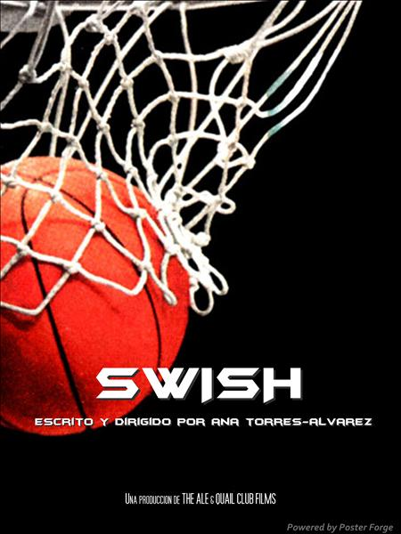 Poster del documental Swish